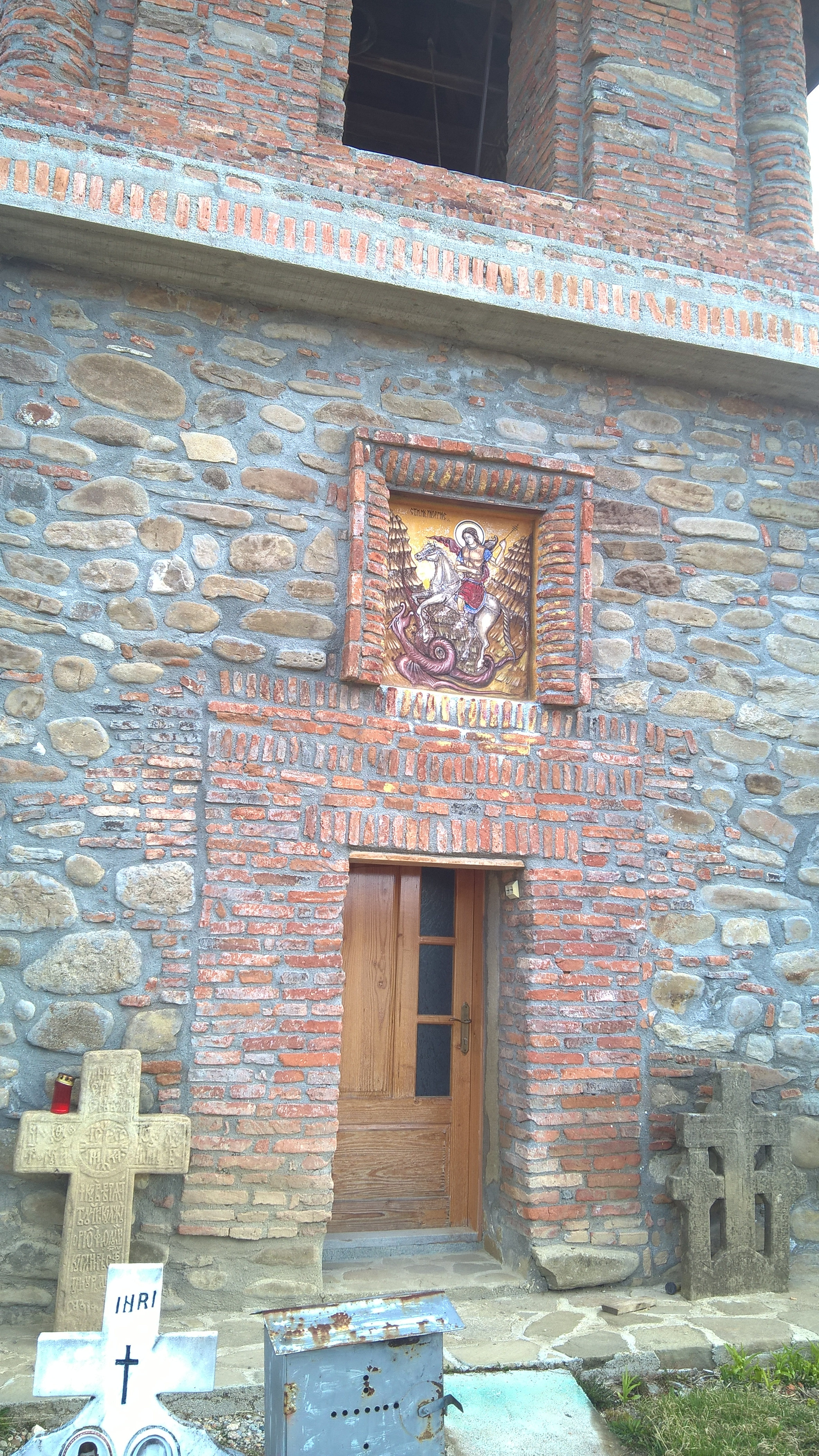 Turn-clopotniță 03